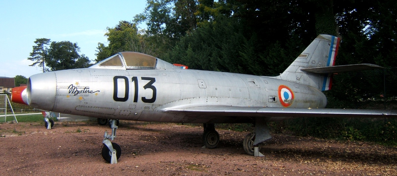 Mystère II conservé au musée du château de Savigny-les-Beaunes